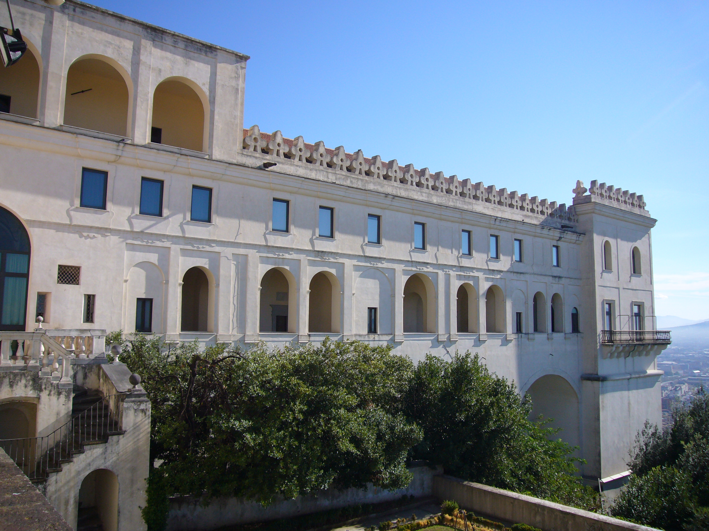 Napoli, Certosa di san Martino: il Quarto del Priore